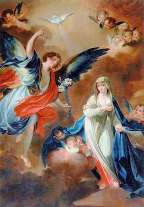 Tableau peint par le peintre russe Chevelkine (1829). Ce tableau se trouve dans l'église de l'Annonciation de Nice.